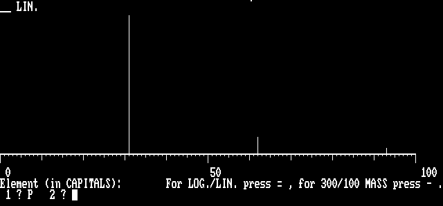 SIMS-Spektrum fon Phosphor